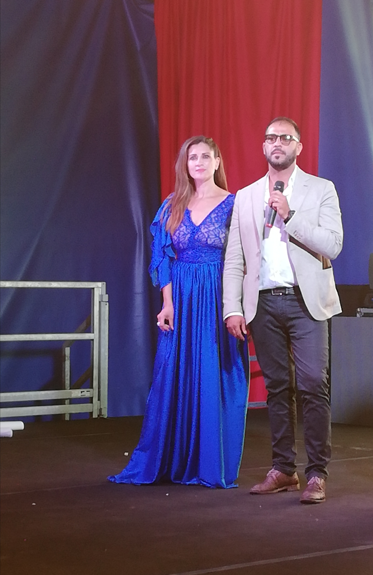 Gennaro Silvestro e Stefania De Francesco all'evento "Motors&Fashion" alla Base NATO di Lago Patria (Giugliano in Campania)